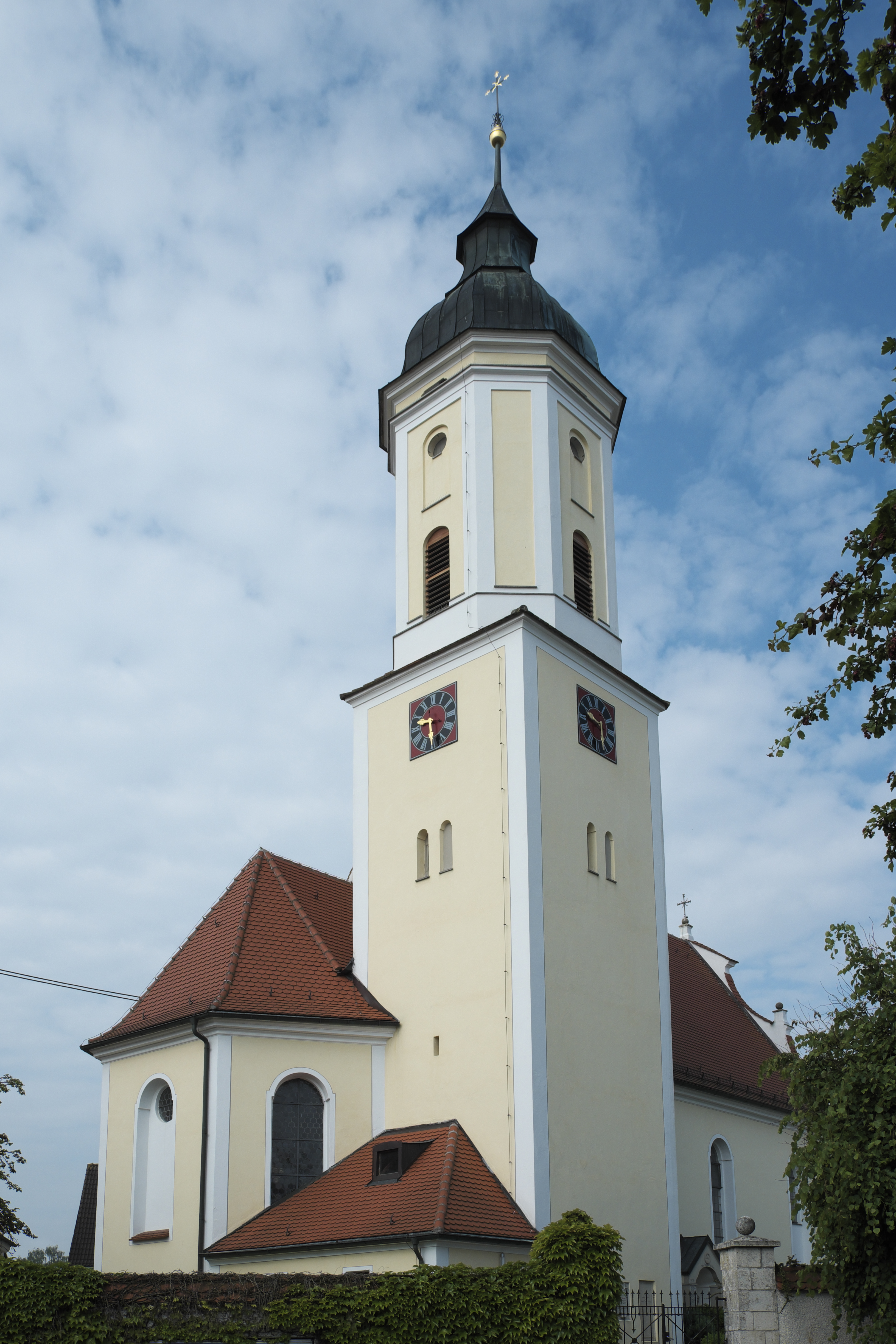 Katholische Pfarrkirche St. Georg in Unterbechingen (Gemeinde Haunsheim) im Landkreis Dillingen an der Donau (Bayern), von 1747/48